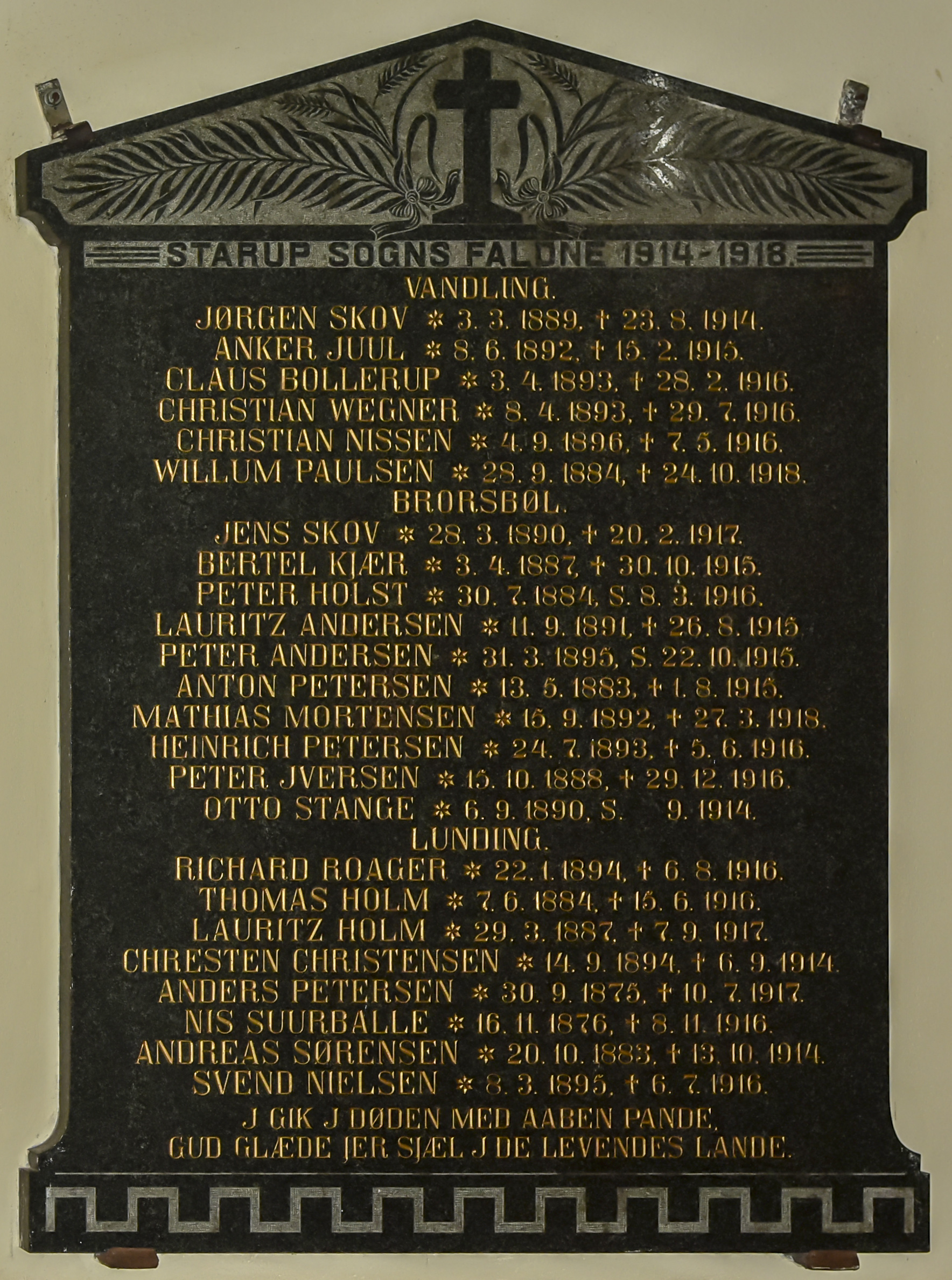 Starup Sogns Faldne i 1. verdenskrig fra Vandling, Brorsbøl og Lunding.